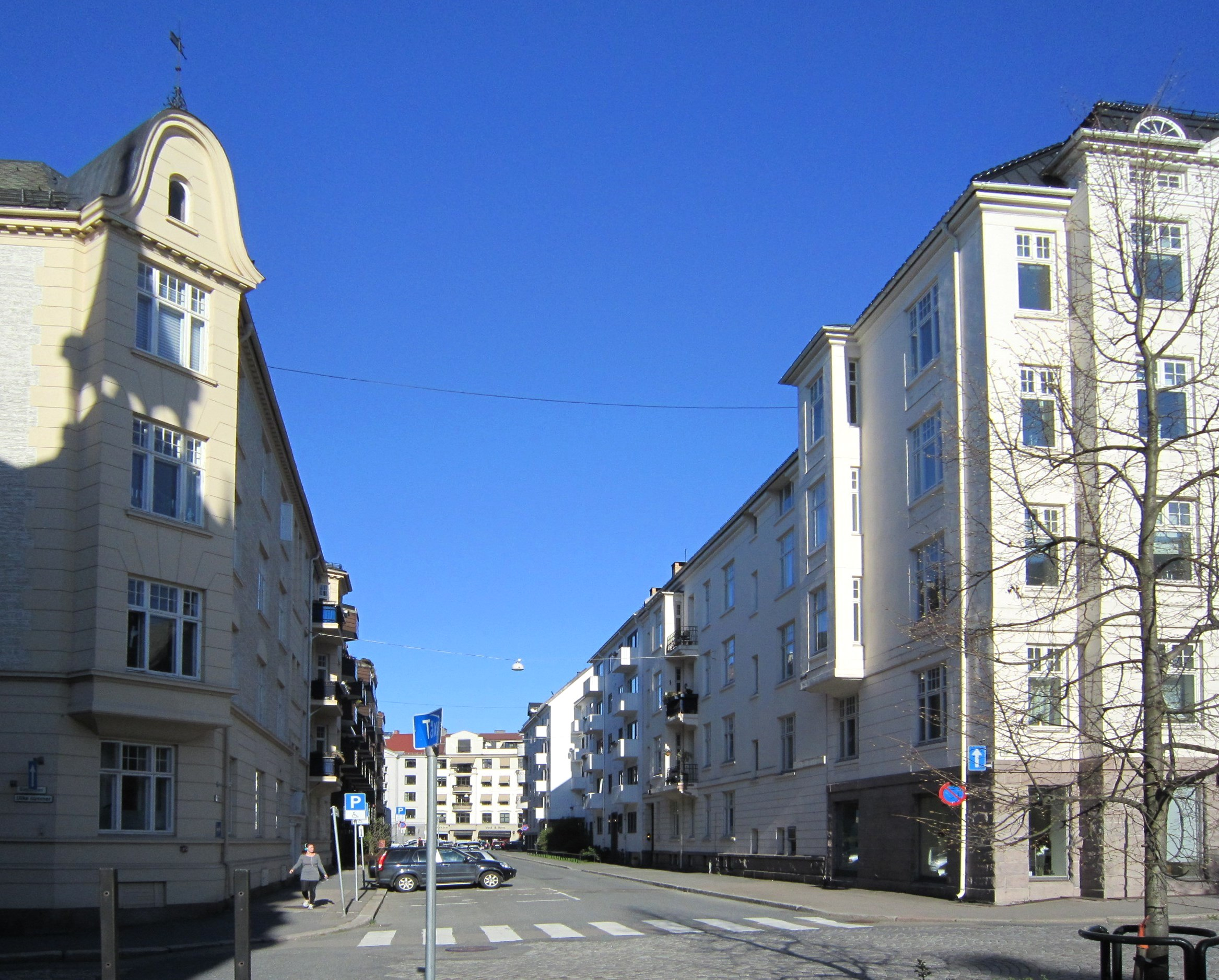 Balchens gate sett fra Gimleveien